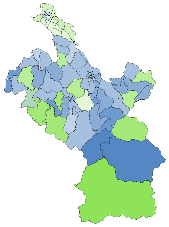 中文（台灣）: 顏色對照表